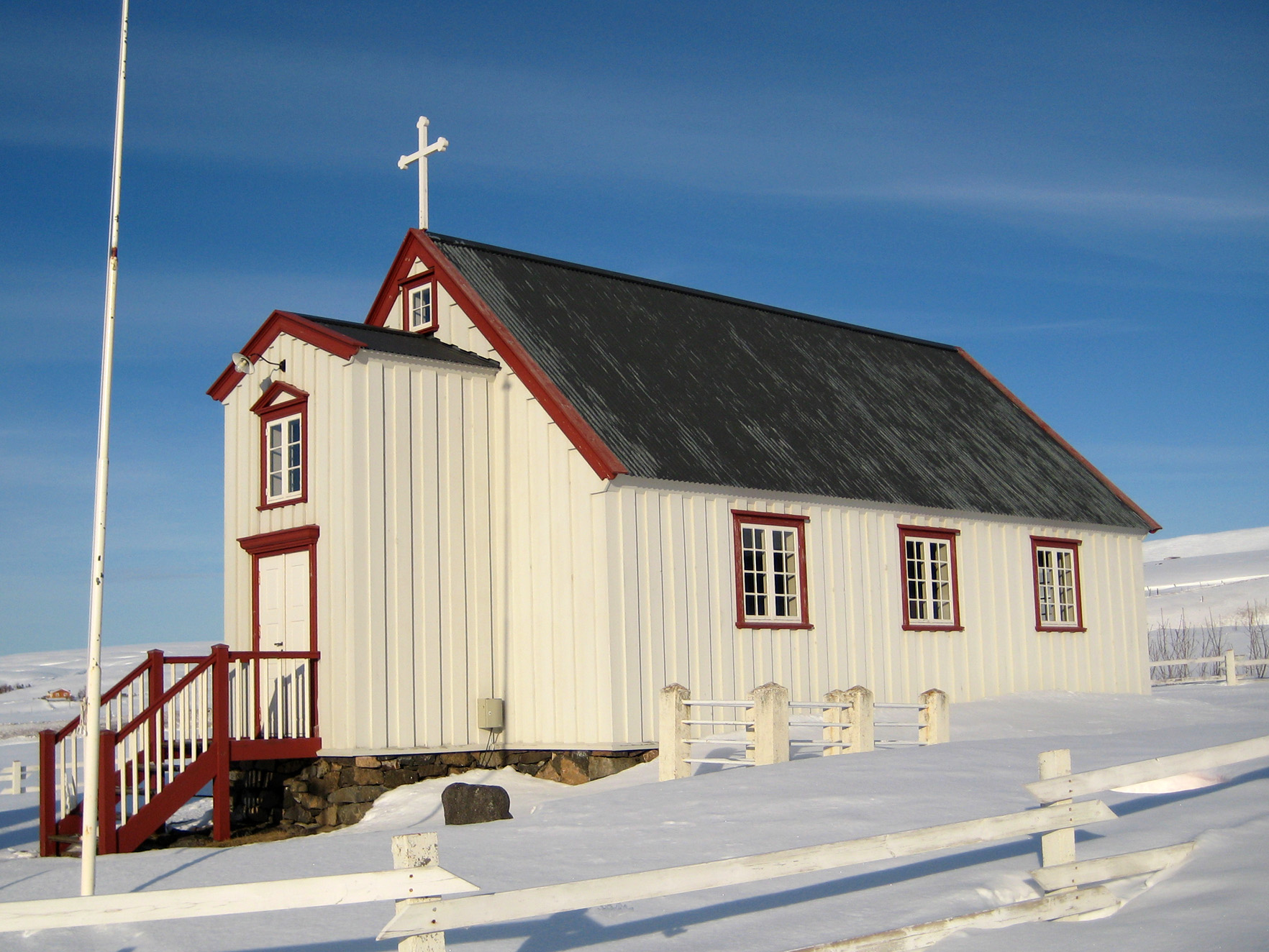 Vallakirkja í Svarfaðardal (North Iceland), Dalvíkurprestakalli, Eyjafjarðarprófastsdæmi